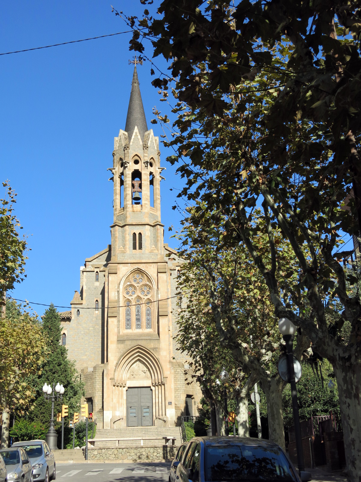 Església nova de Santa Coloma de Gramenet